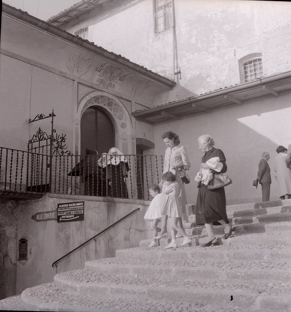 Servizio fotografico : Varese, 1980 / Paolo Monti. - Buste: 17, Fototipi: 17 : Negativo b/n, gelatina bromuro d'argento/ pellicola ; 6x6. - ((Serie costituita da 17 negativi identificati con i nn.: R1569-1586. La suddetta serie è contenuta nella scatola identificata con la numerazione R1529-1734. Sul coperchio della scatola: "Santuari 6x6". - Occasione: Documentazione per la pubblicazione: Eugenio RICCOMINI, Ordine e vaghezza: scultura in Emilia nell'età barocca, Bologna, Zanichelli, 1972